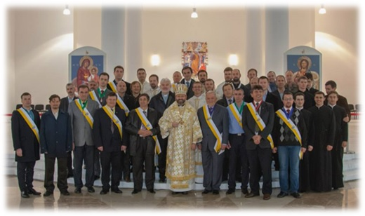 Перша рада Лицарів Колумба в Україні